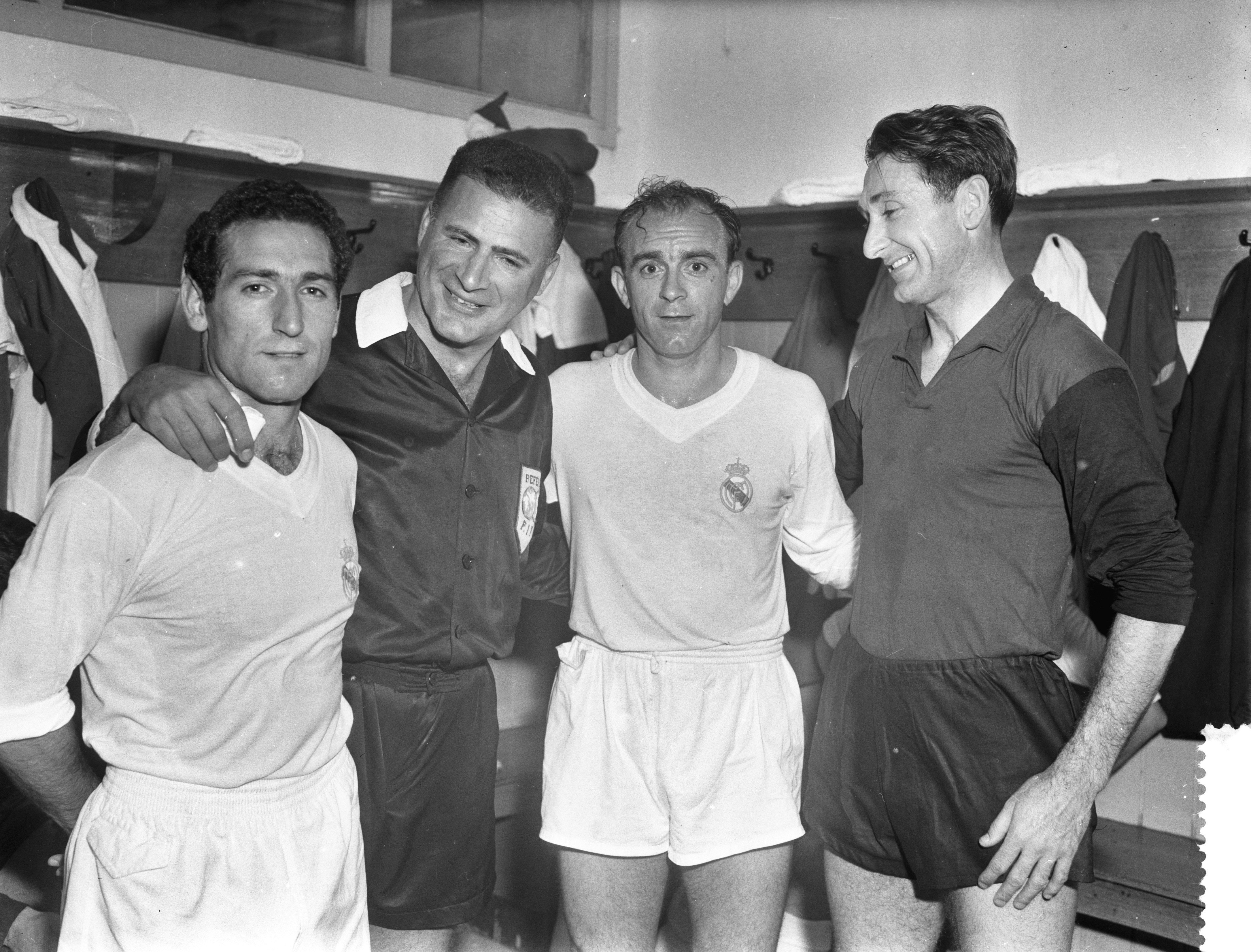 Collectie / Archief : Fotocollectie Anefo Reportage / Serie : [ onbekend ] Beschrijving : Amsterdam tegen Real Madrid 1-4 in het Olympisch Stadion te Amsterdam, v.l.n.r. Gento, Leo Horn , Di Stefano en Wilkes Datum : 30 juni 1959 Fotograaf : Rossem, Wim van / Anefo Auteursrechthebbende : Nationaal Archief Materiaalsoort : Negatief (zwart/wit) Nummer archiefinventaris : bekijk toegang 2.24.01.04 Bestanddeelnummer : 910-4823